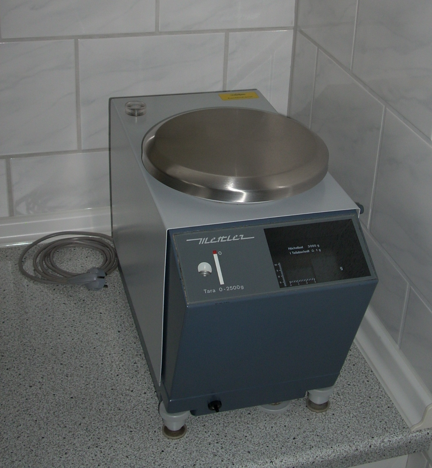 Automatische Balkenwaage „P 3“ mit Leuchtbildanzeige von Mettler, Bauzeitraum 1964 - 1982 (das abgebildete Exemplar wurde 1982 hergestellt). Skalenbereich 0 - 3000 g, Tarierfähigkeit 2500 g (somit 5500 g Maximalbelastung möglich) 1 d = e = 1 g, schätzbar 0,2 g. Originalzustand.